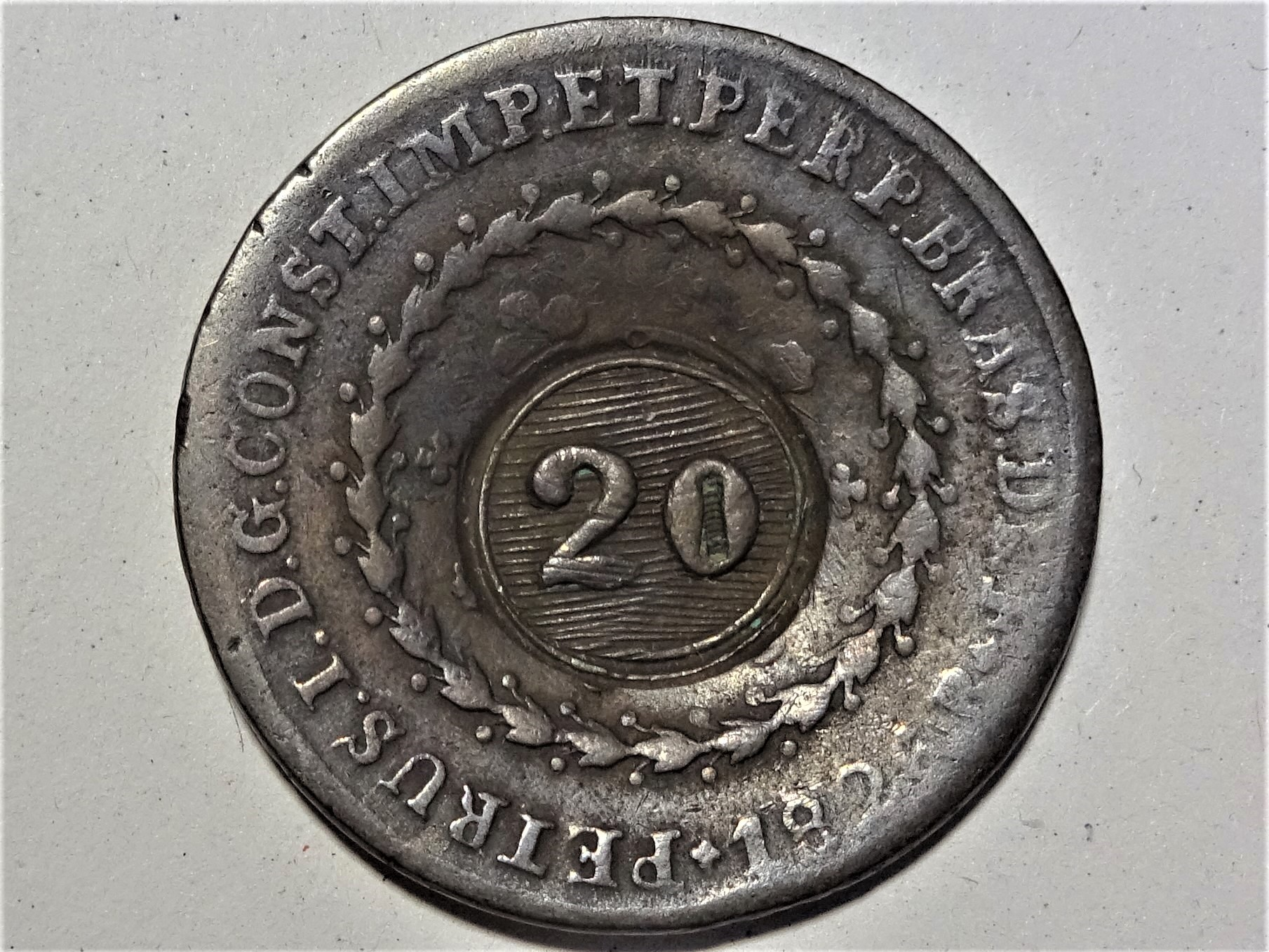 80 Reismünze, Brasilien, 1826, mit Gegenstempel "20"; Schön/Cartier, Weltmünzkatalog 19. Jahrhundert, Brasilien Nr. 105